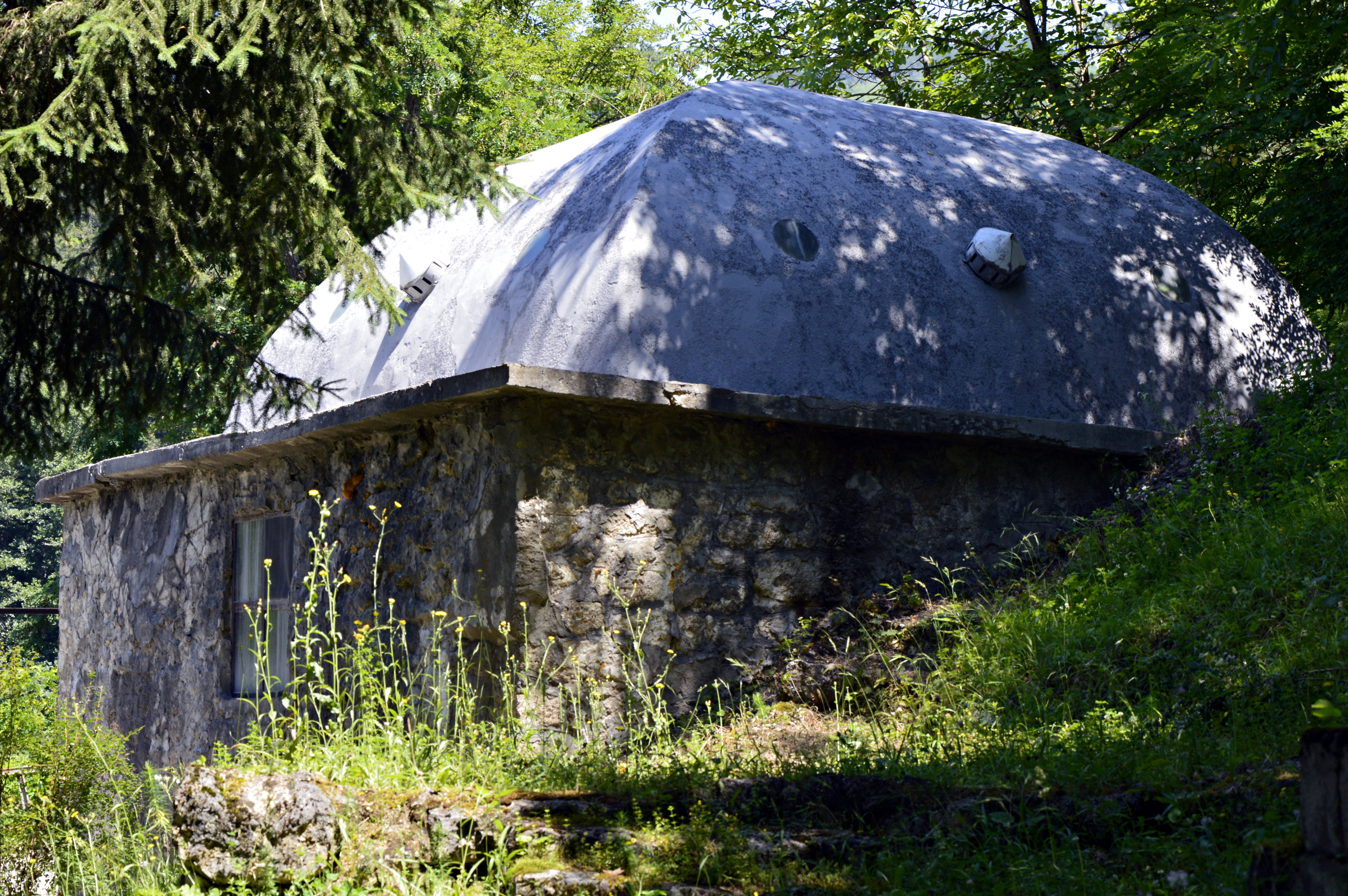 Banjski Hamam iz malo drugacijek ugla odoljeva rubu vremena jos je u punoj funkciji i nalazi se u Visegradskoj Banji udaljenoj 5 kilometara od Visegrada. Сликава е подигната во рамките на проектот „По трагата на душата 2015“.